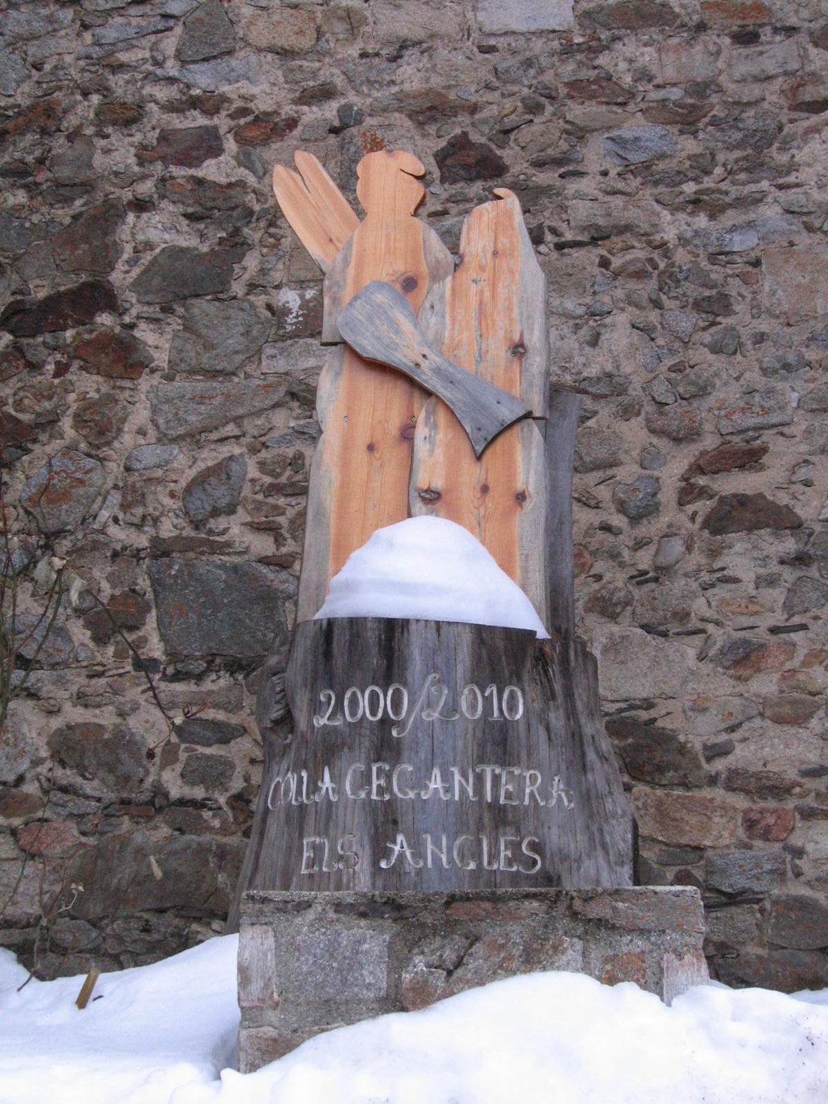 Els Angles / Les Angles, statue "biloingue".